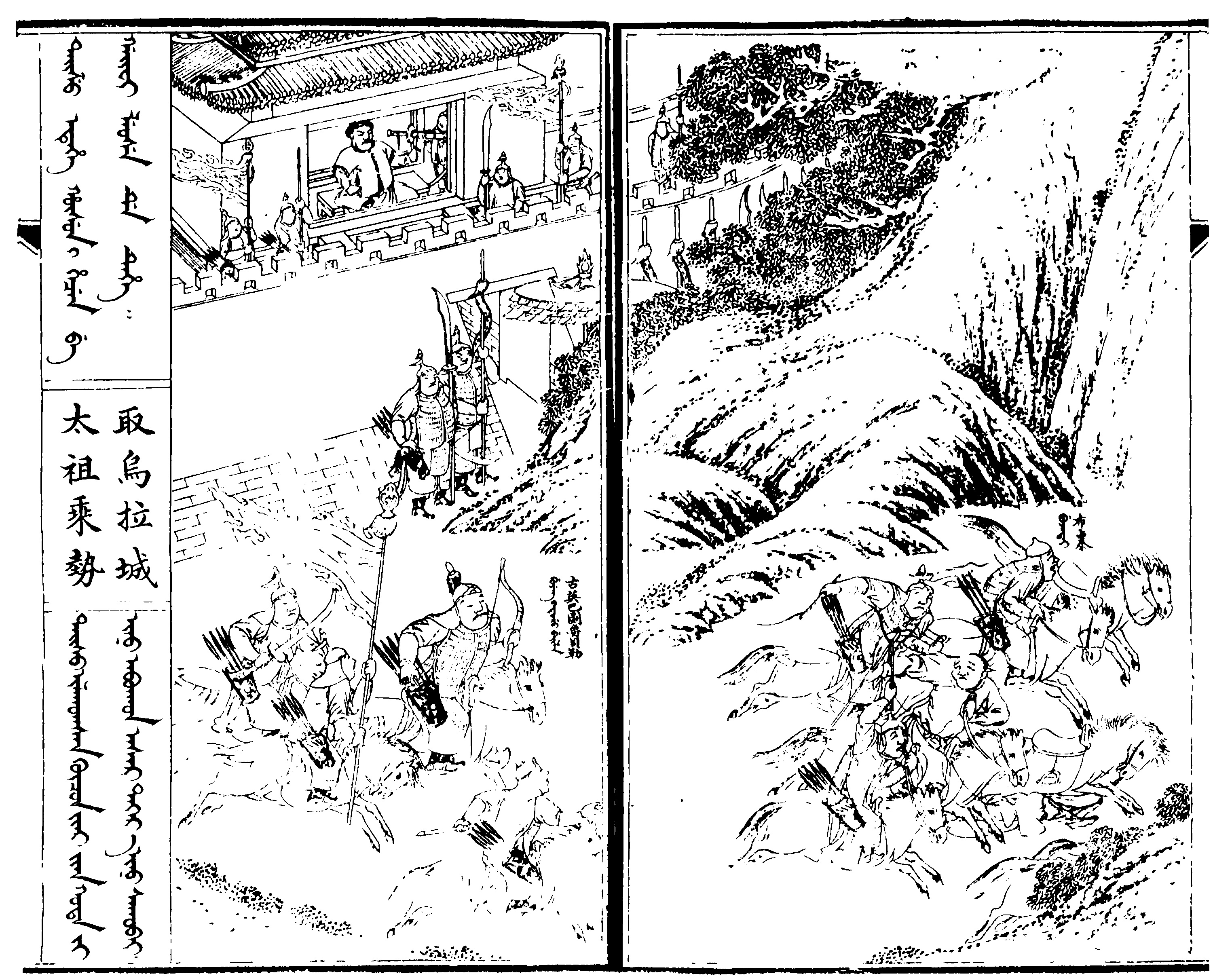 满洲实录插画之一